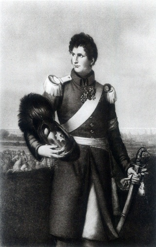 Wilhelm Graf von Schwerin 1773-1815; Prussian Colonel who fell in the Battle of Waterloo